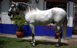 caballo de raza azteca